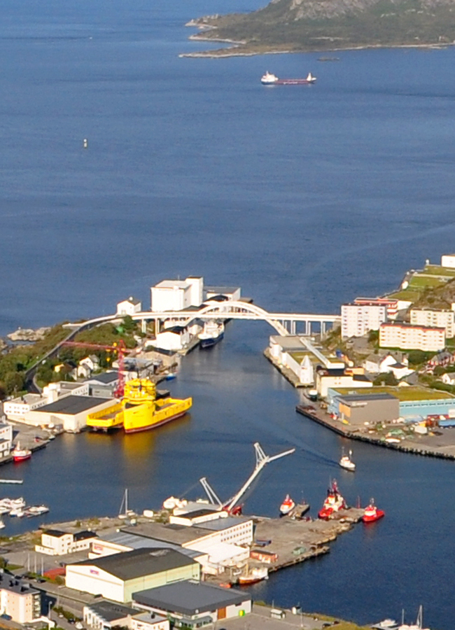 Steinsvågbrua sett fra Sukkertoppen.